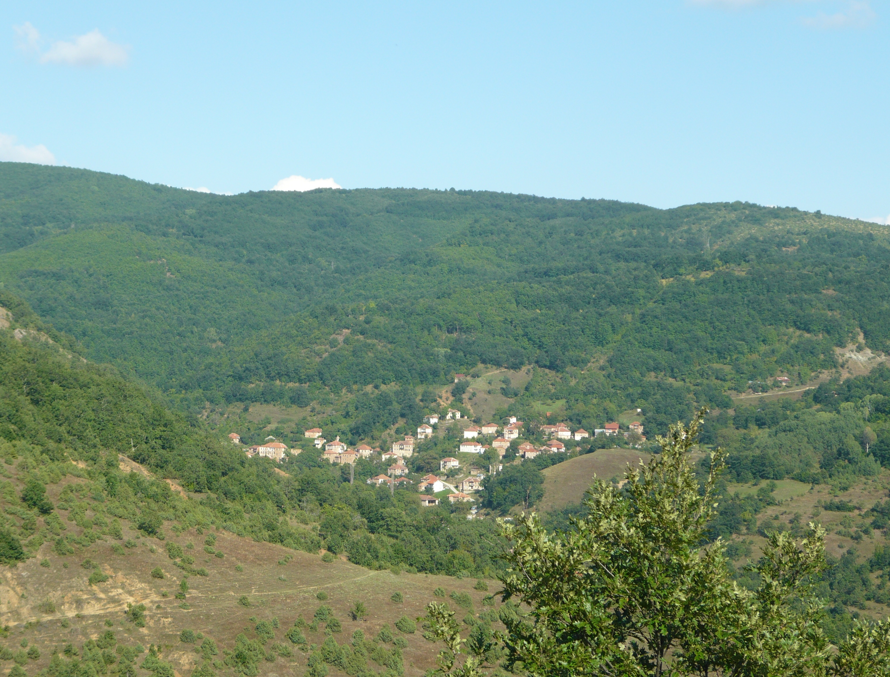 Панорама на Брезово